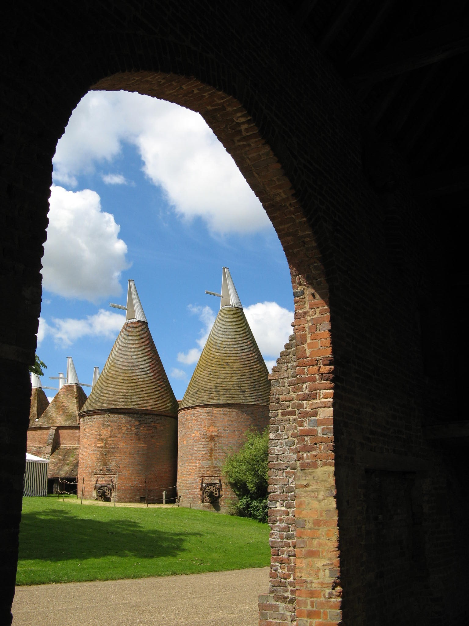 Hopfendarrtürme in Sissinghurst